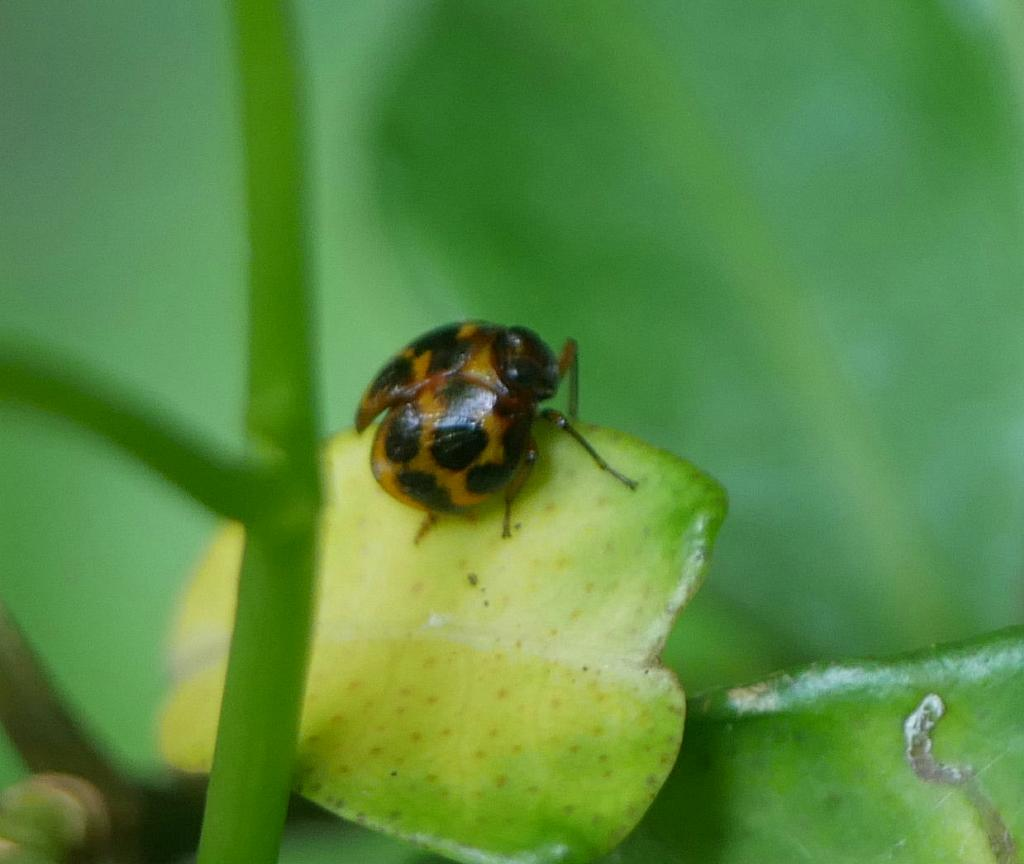 Ishiharanus iguchii：キボシマルウンカ 2018/08/07 和歌山県すさみ町：Susami Town, Wakayama Pref. Japan